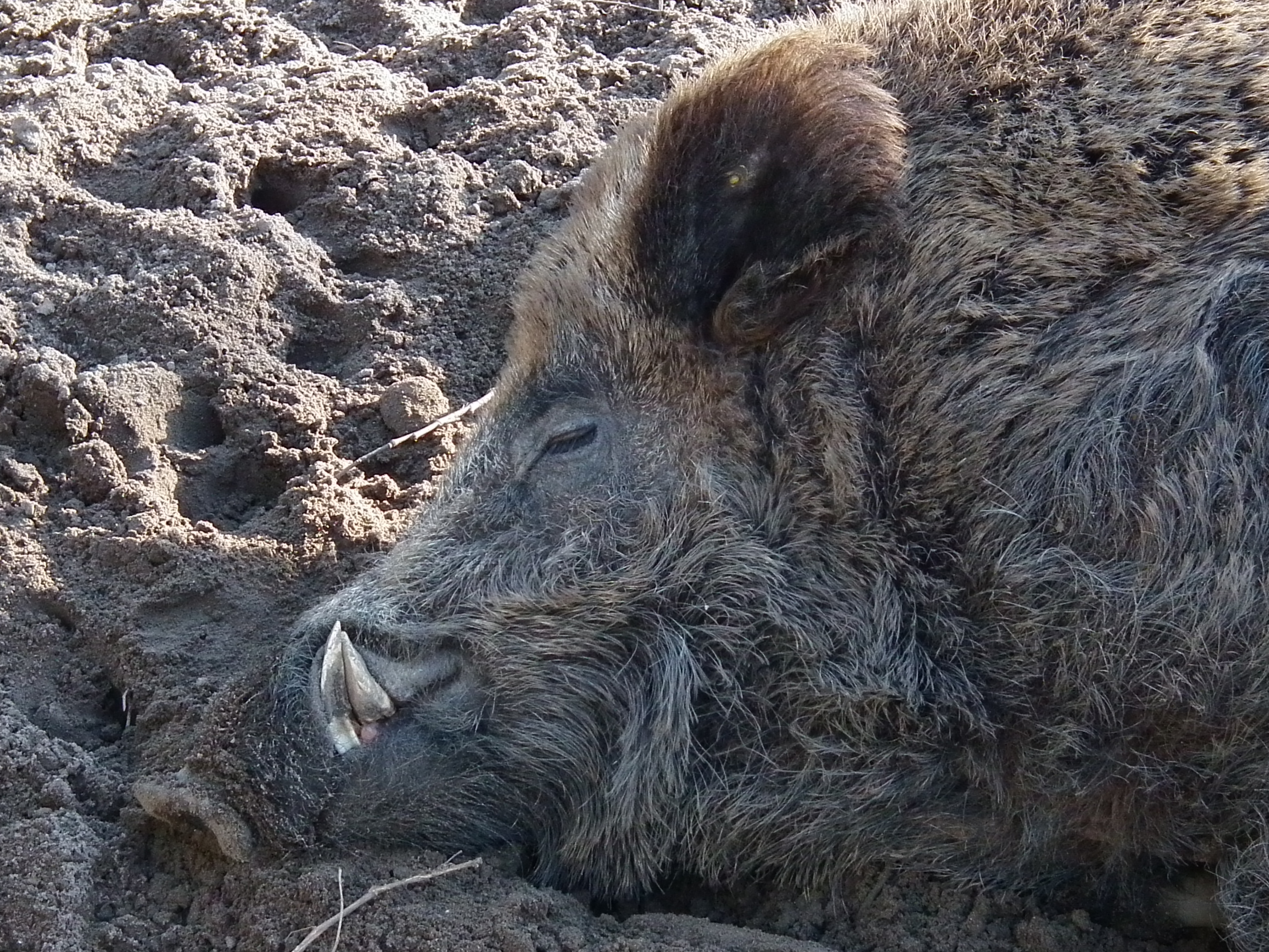 Kopf eines Keilers (Sus scrofa), fotografiert im Wildgehege Rheinauer Wald (Mannheim, Baden-Württemberg, Deutschland)